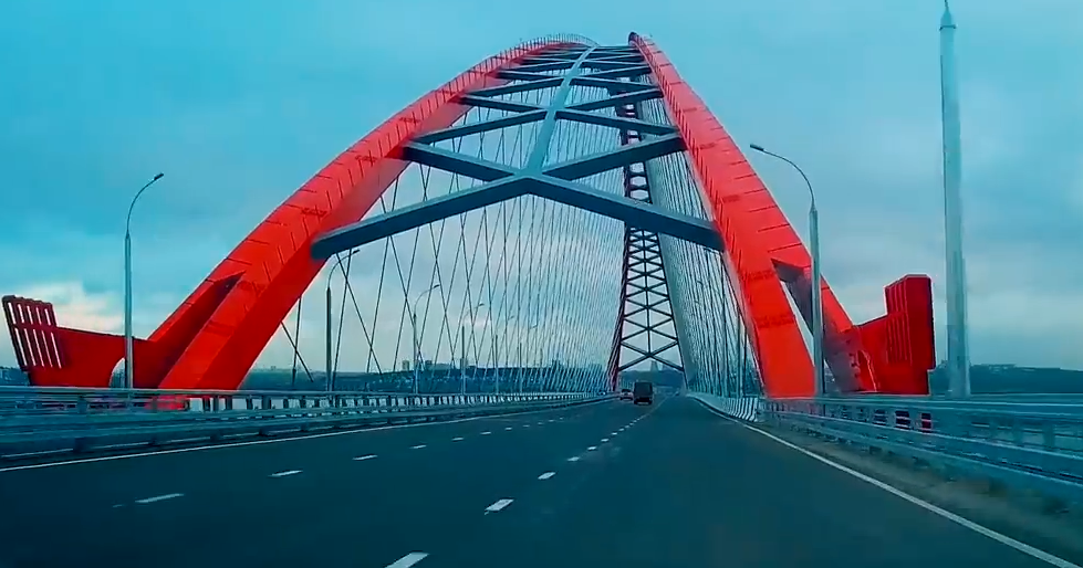 Бугринский мост Новосибирск